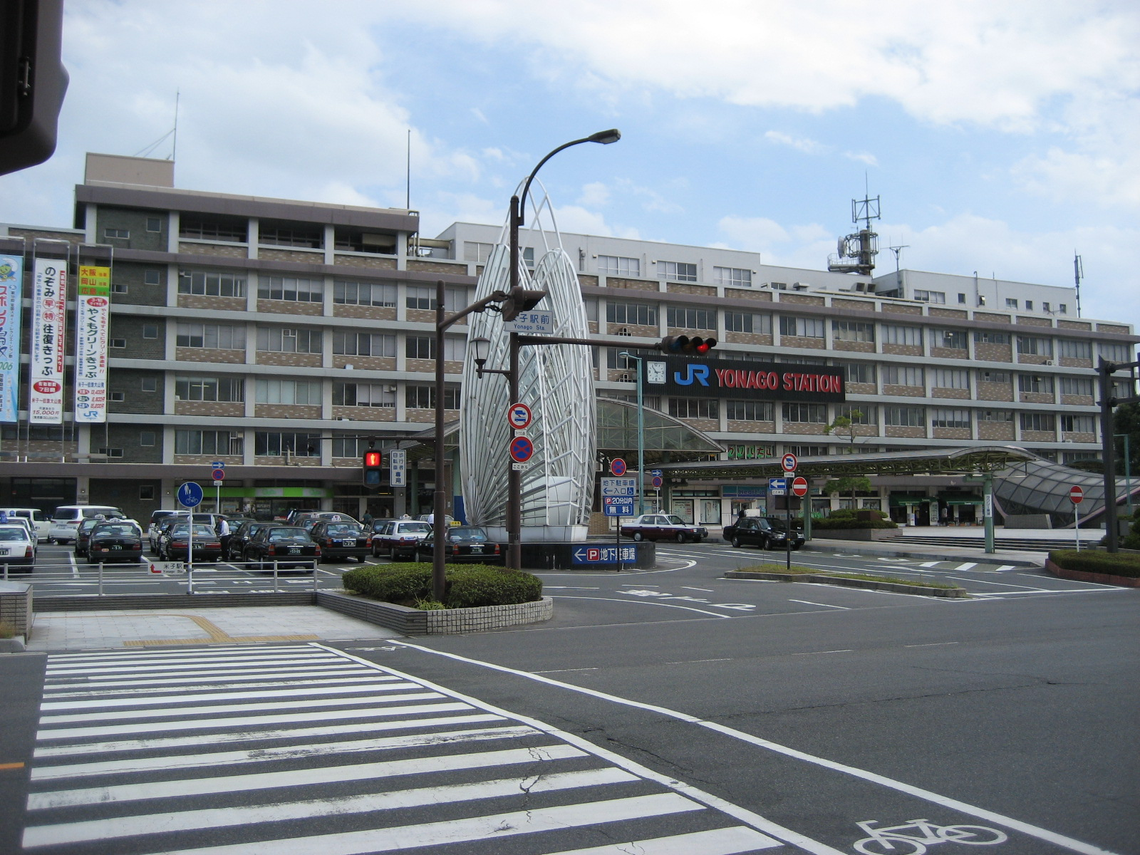 JR Yonago Sta.